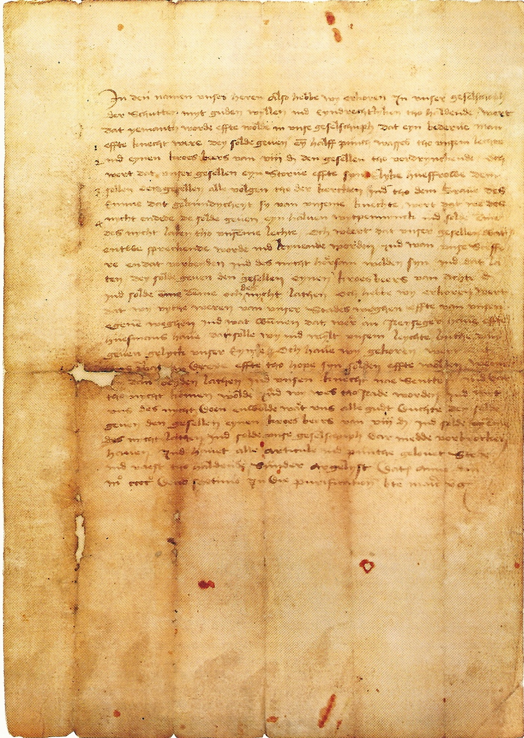 Brilon, die ersten Statuten der Schützenbruderschaft vom 2. Februar 1417.jpg